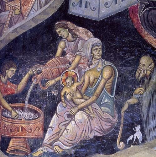 Раѓањето Христово, детал,1343-1345 год., јужен зид Црква Св. Ѓотѓи, Полошки Манастир